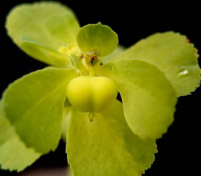 Euphorbia helioscopia